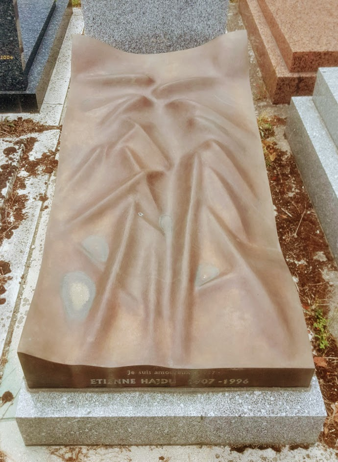 Grabmal von Etienne Hajdu auf dem Pariser Friedhof Thiais